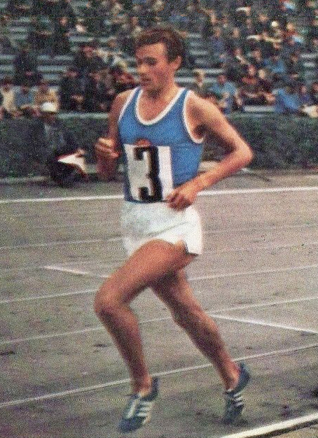 CAMPIONI dello SPORT 1968/69-n.39- MECSER-UNGHERIA-ATLETICA LEGGERA